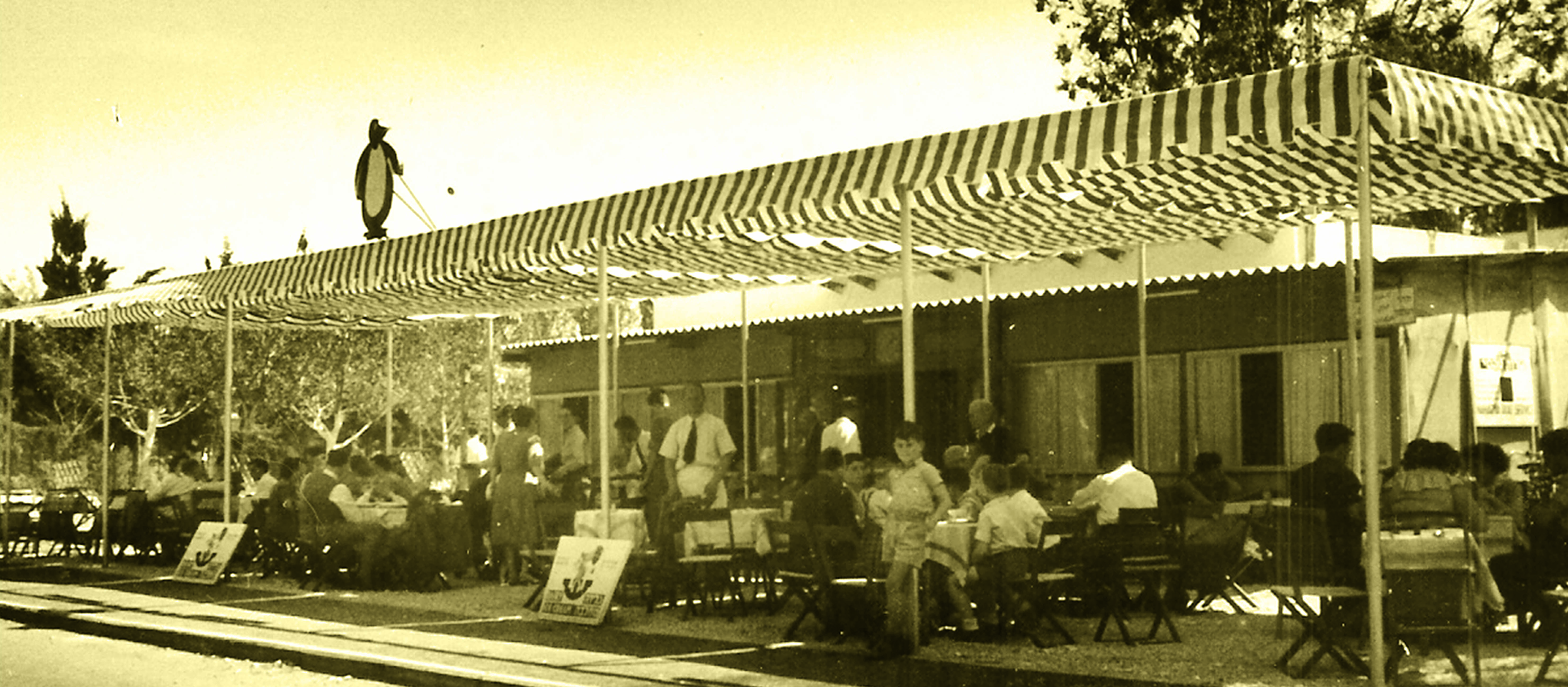 המסעדה לפני השיפוץ, שנות ה-50